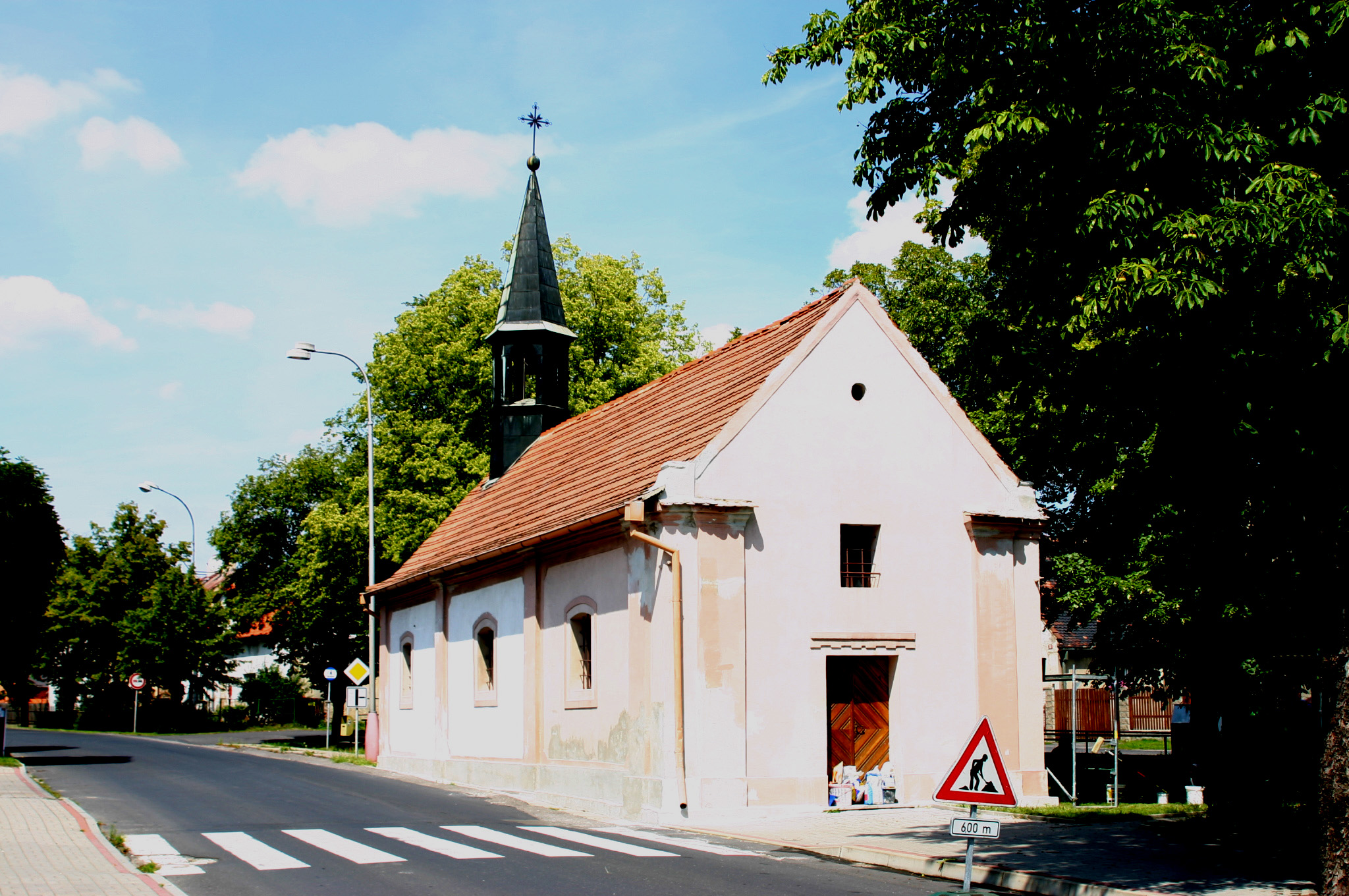 Kaple sv. Antonína Paduánského (Louka u Litvínova), Louka u Litvínova